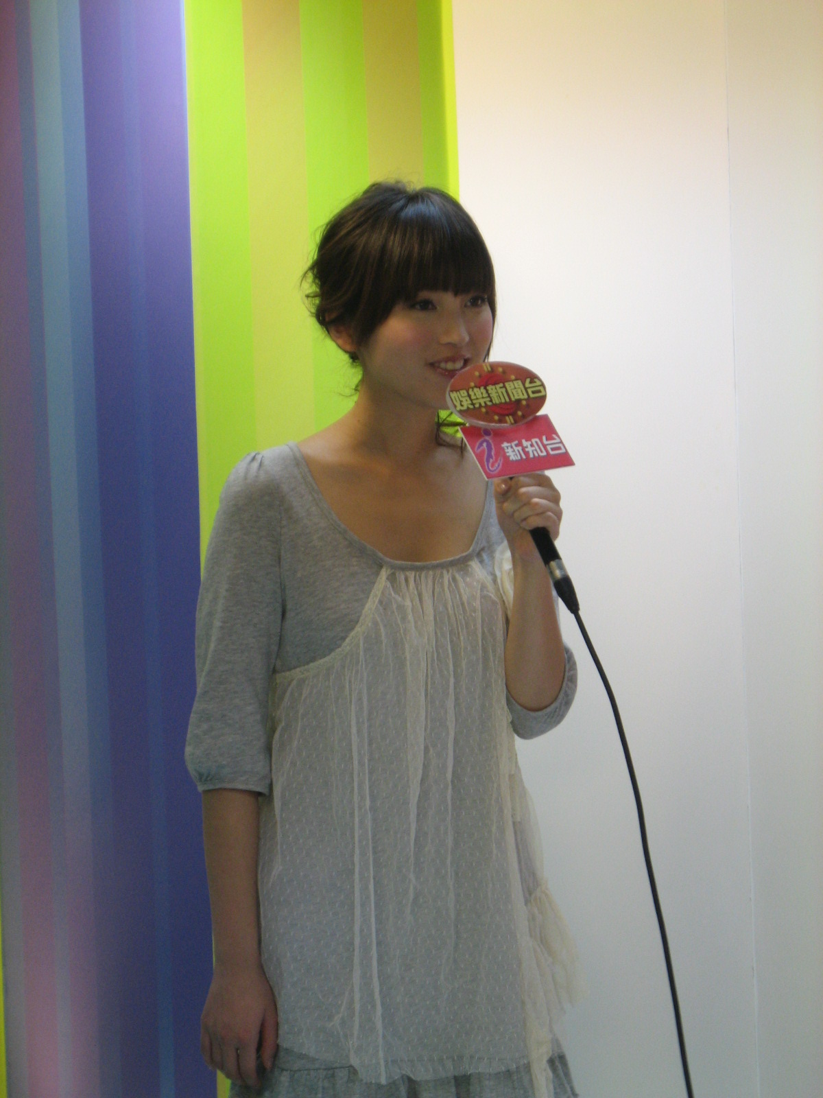 金莎在香港接受採訪